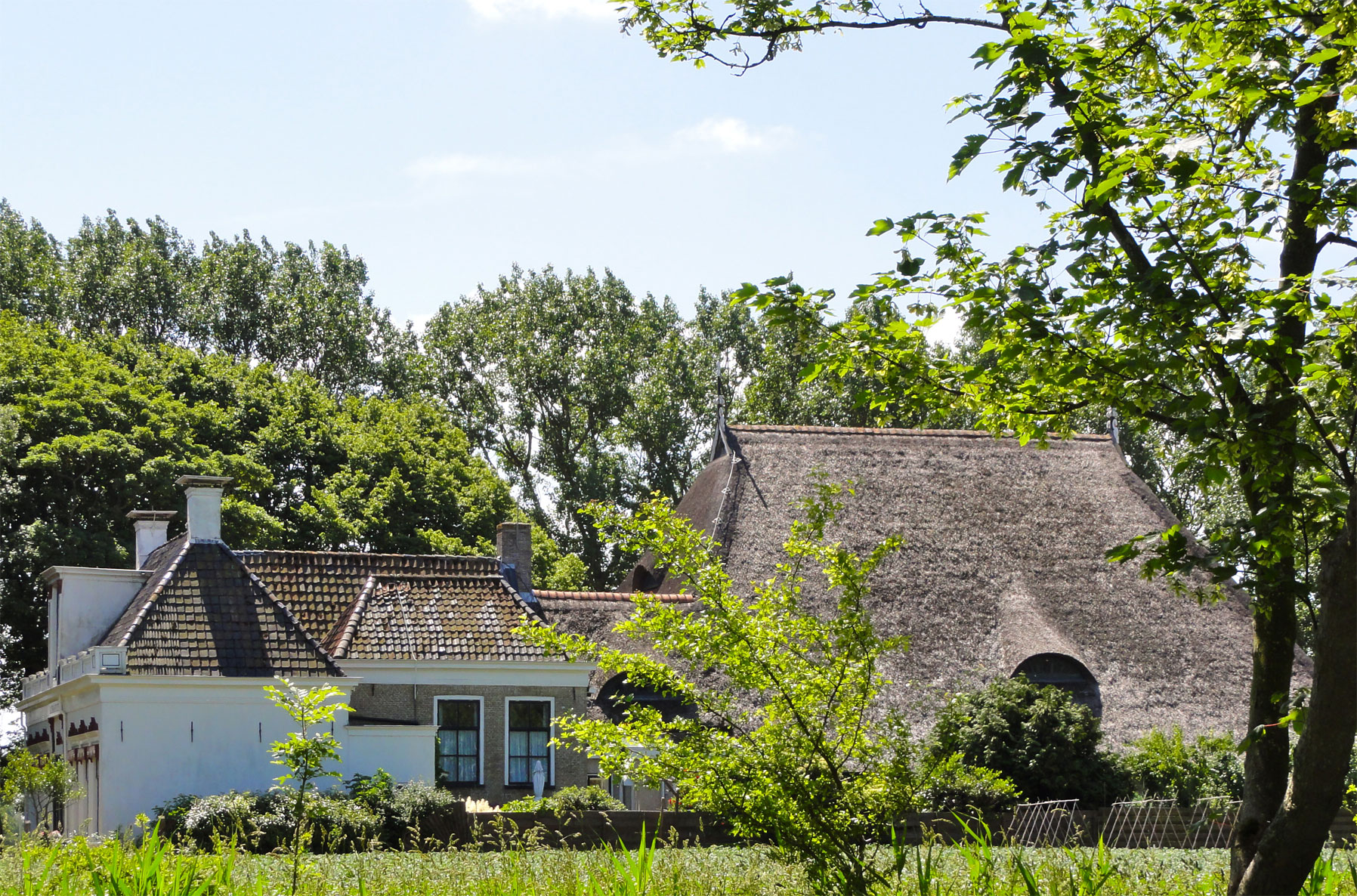 Latsmastate nabij Sexbierum